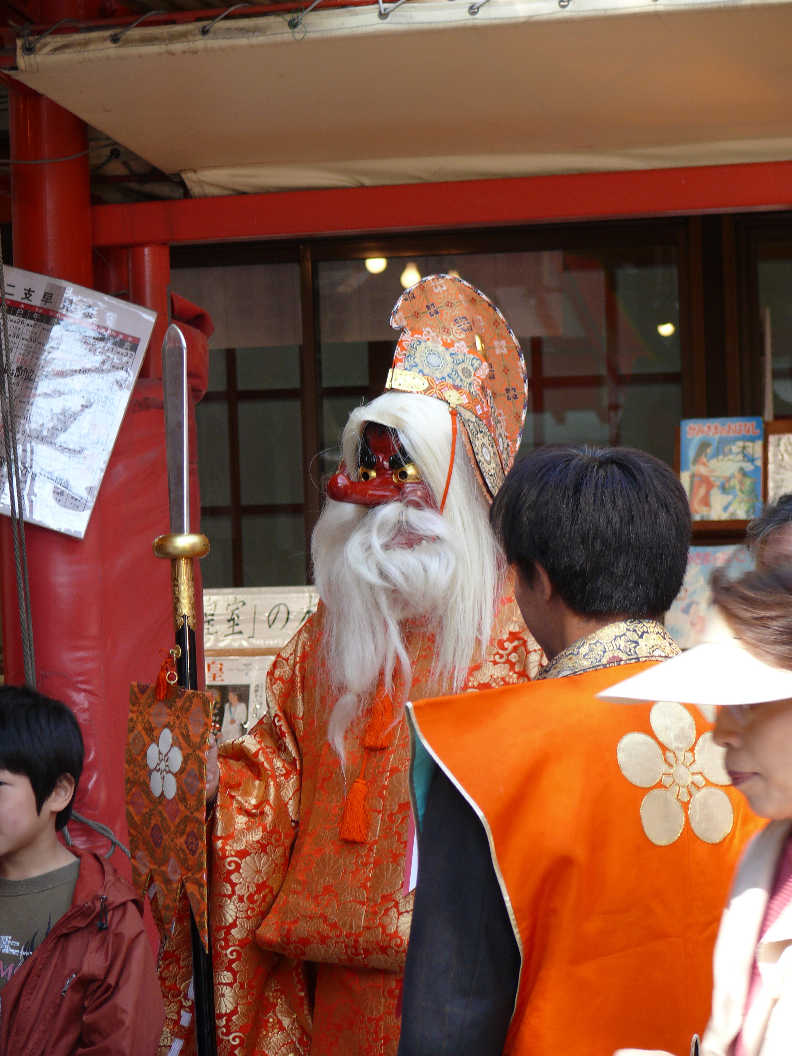 Tengu.